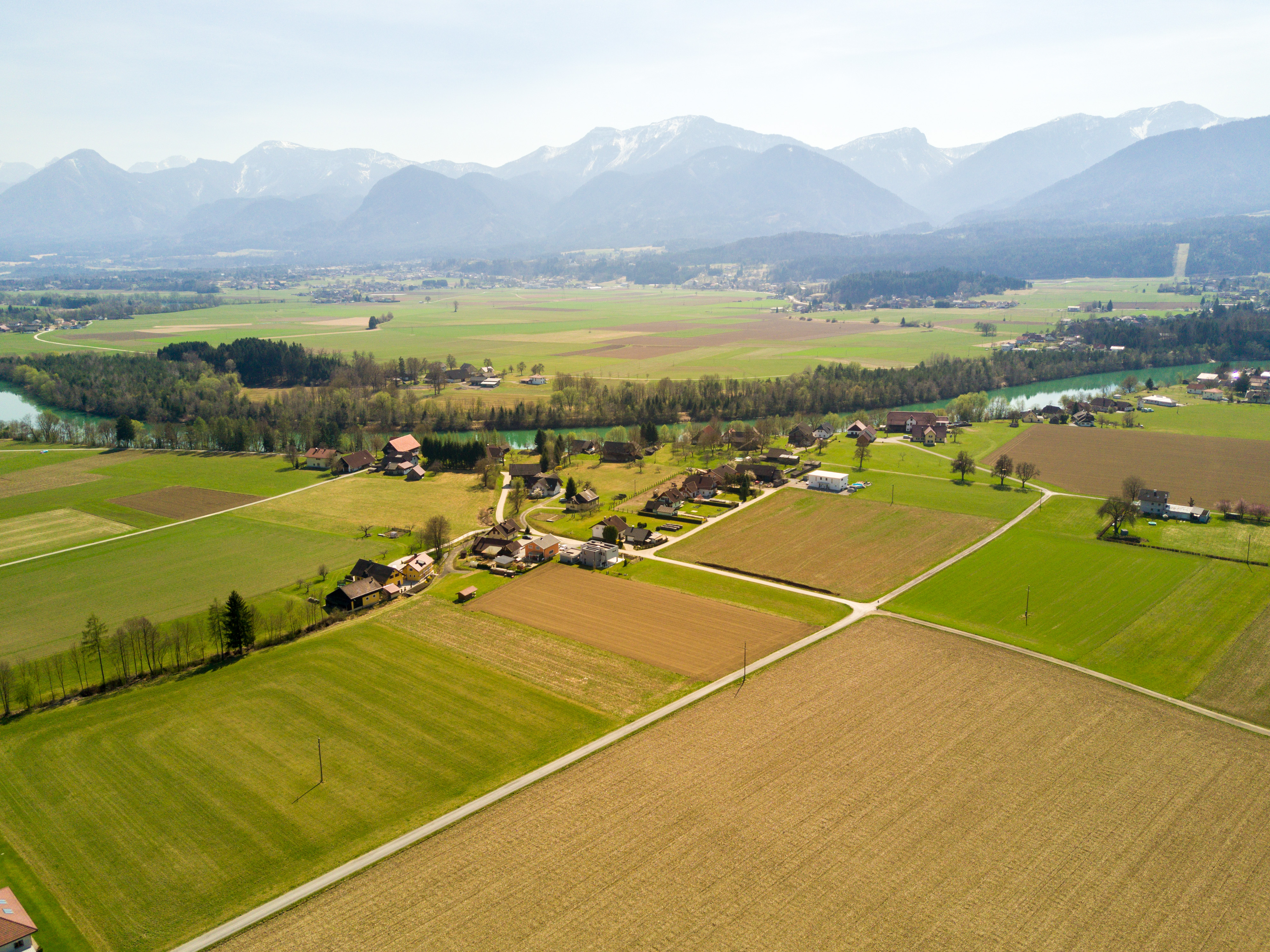 Unterrer Ortsteil von Dieschitz